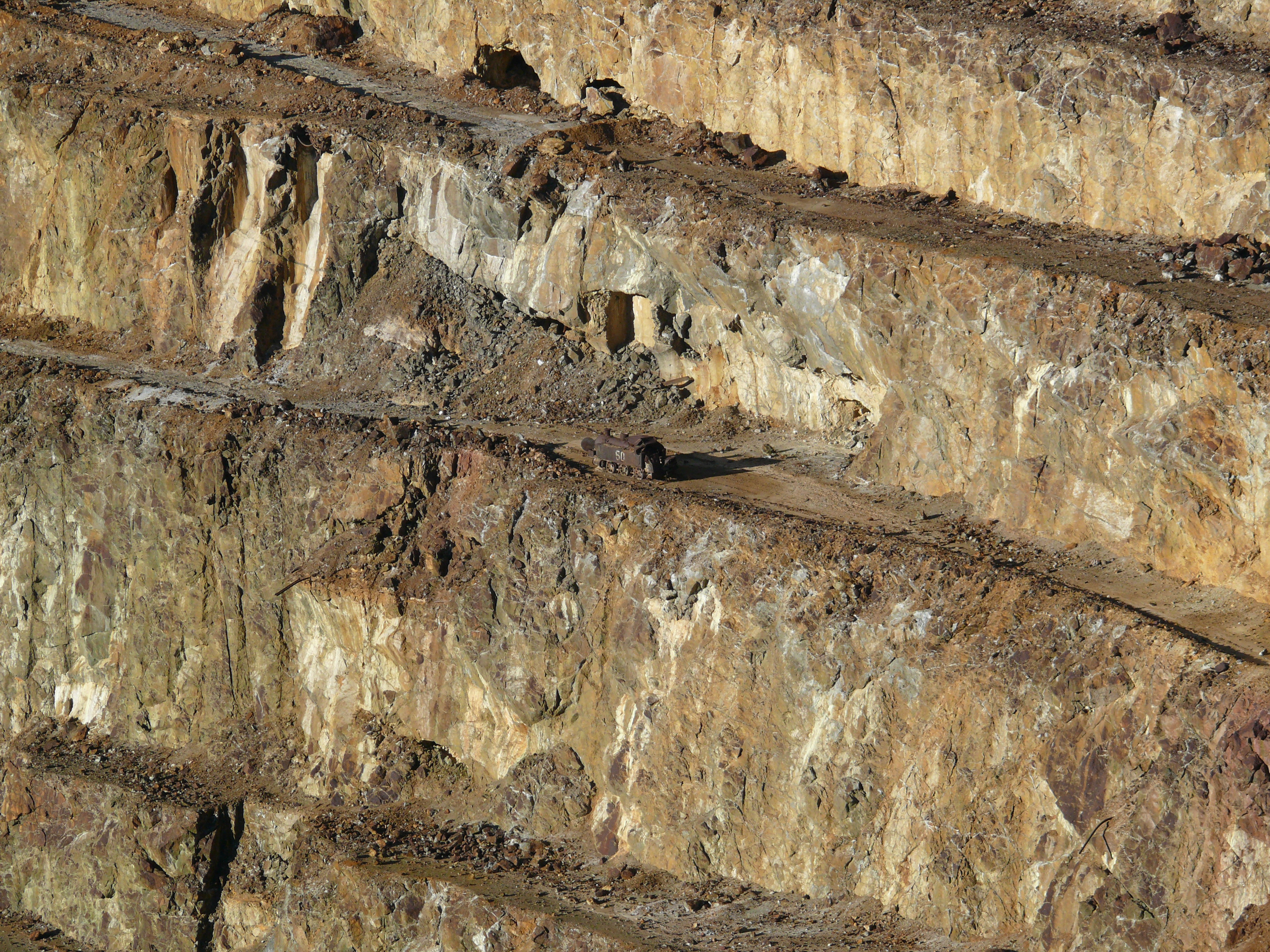 Locomotora del interior de Corta Atalaya.